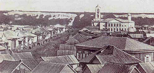 Breite Gasse in Mariental, Russland.